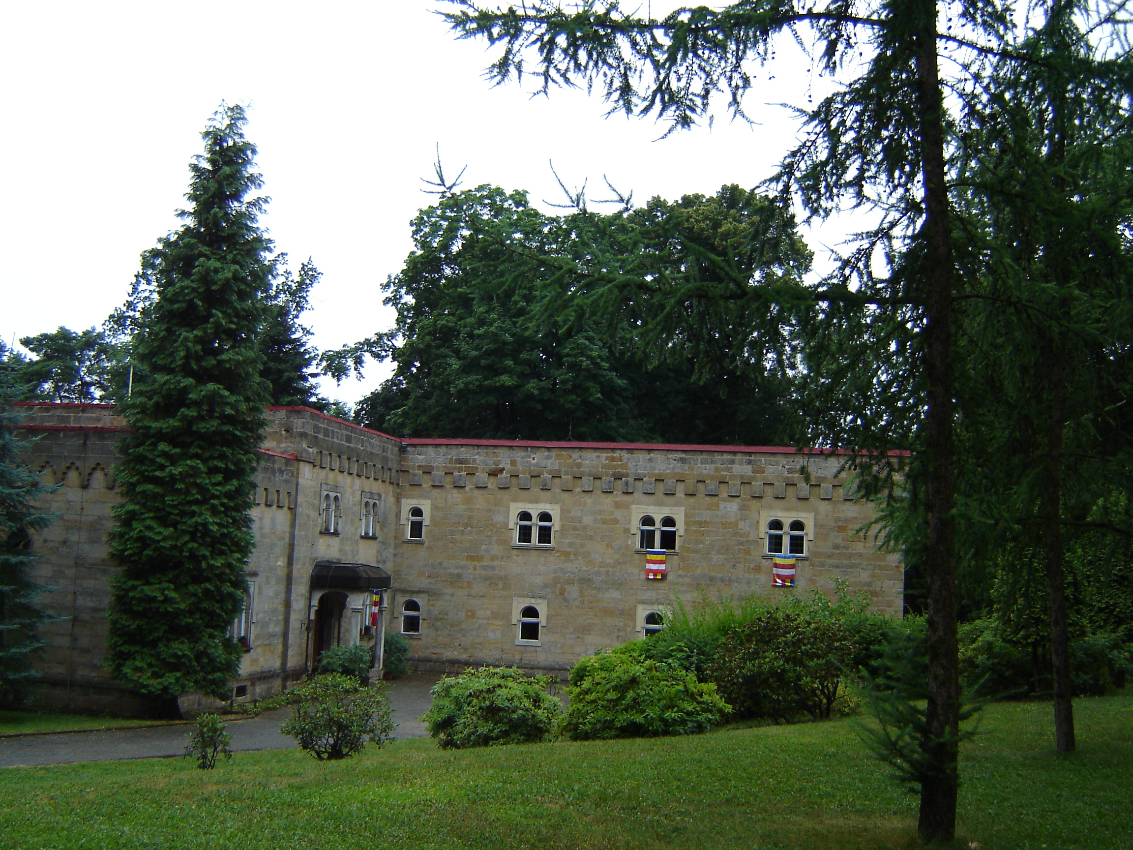 Zámek - zámeček Slavín Tupadly, Tupadly 87